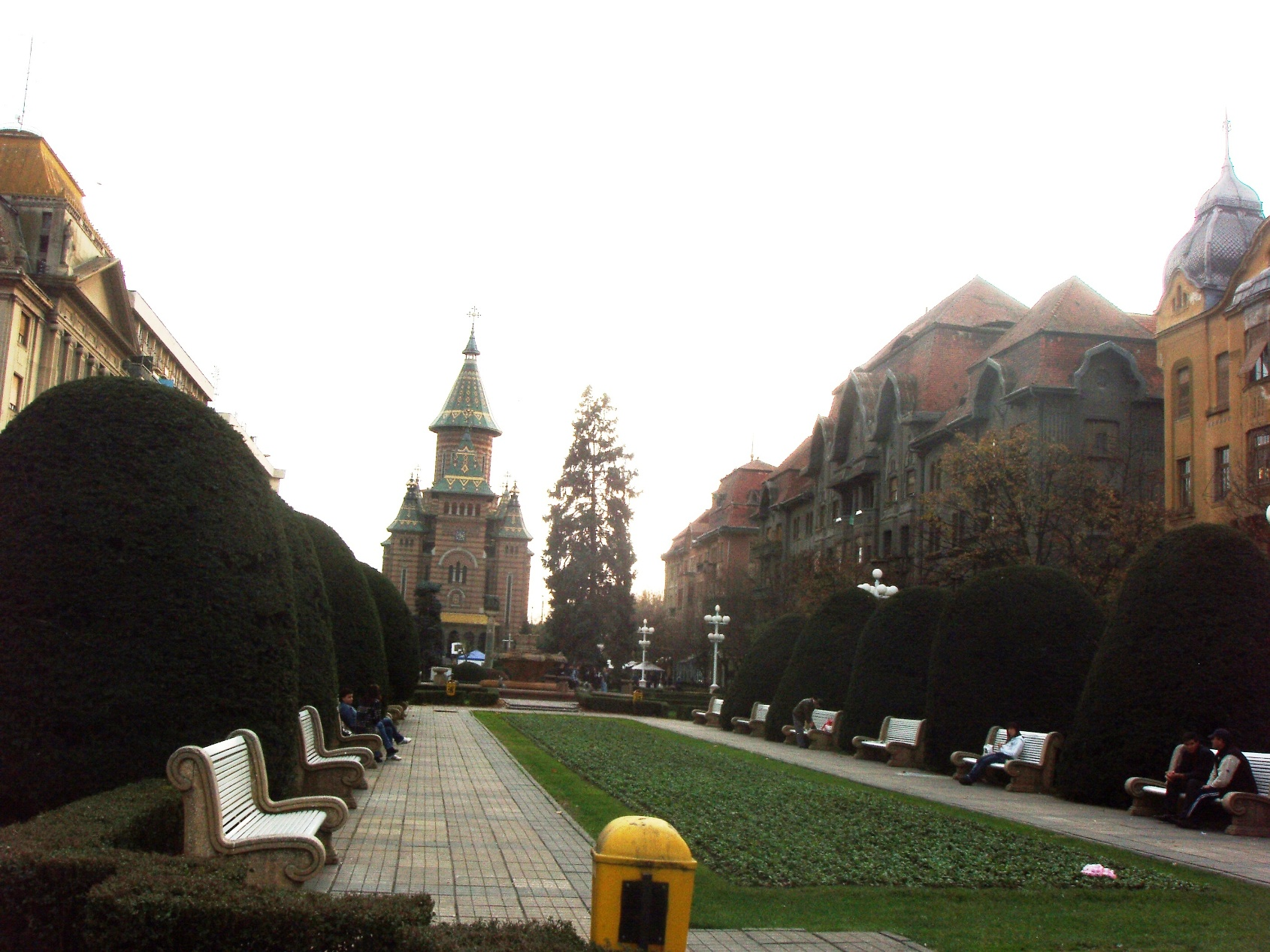 Трг у Темишвару.